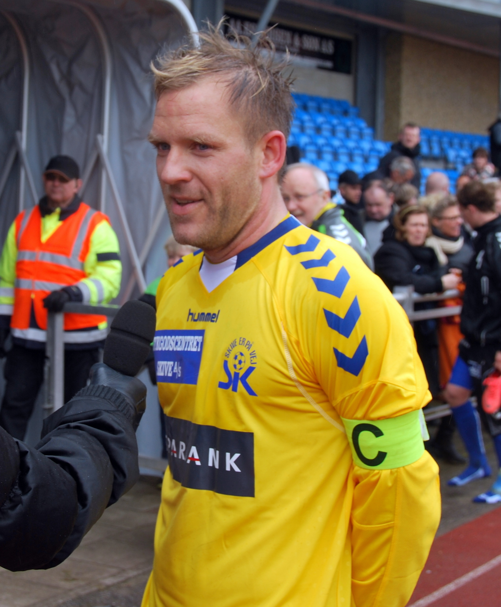 Fodboldspilleren Martin Thomsen fra Skive IK. Her efter en 1. divisionskamp mod Blokhus FC på Skive Stadion.